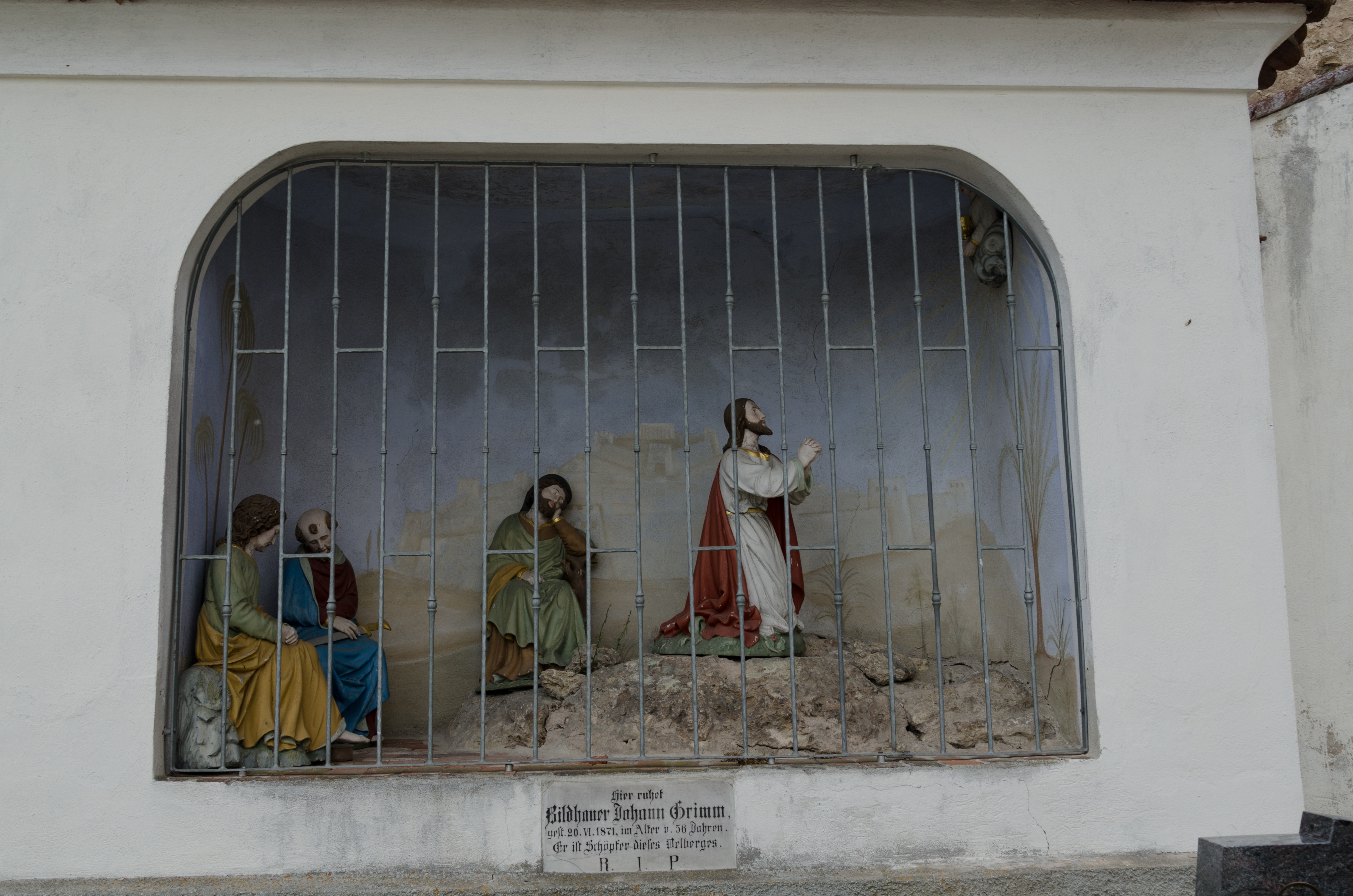 Kath. Kirche St. Maria in Marktoffingen, Ölberg